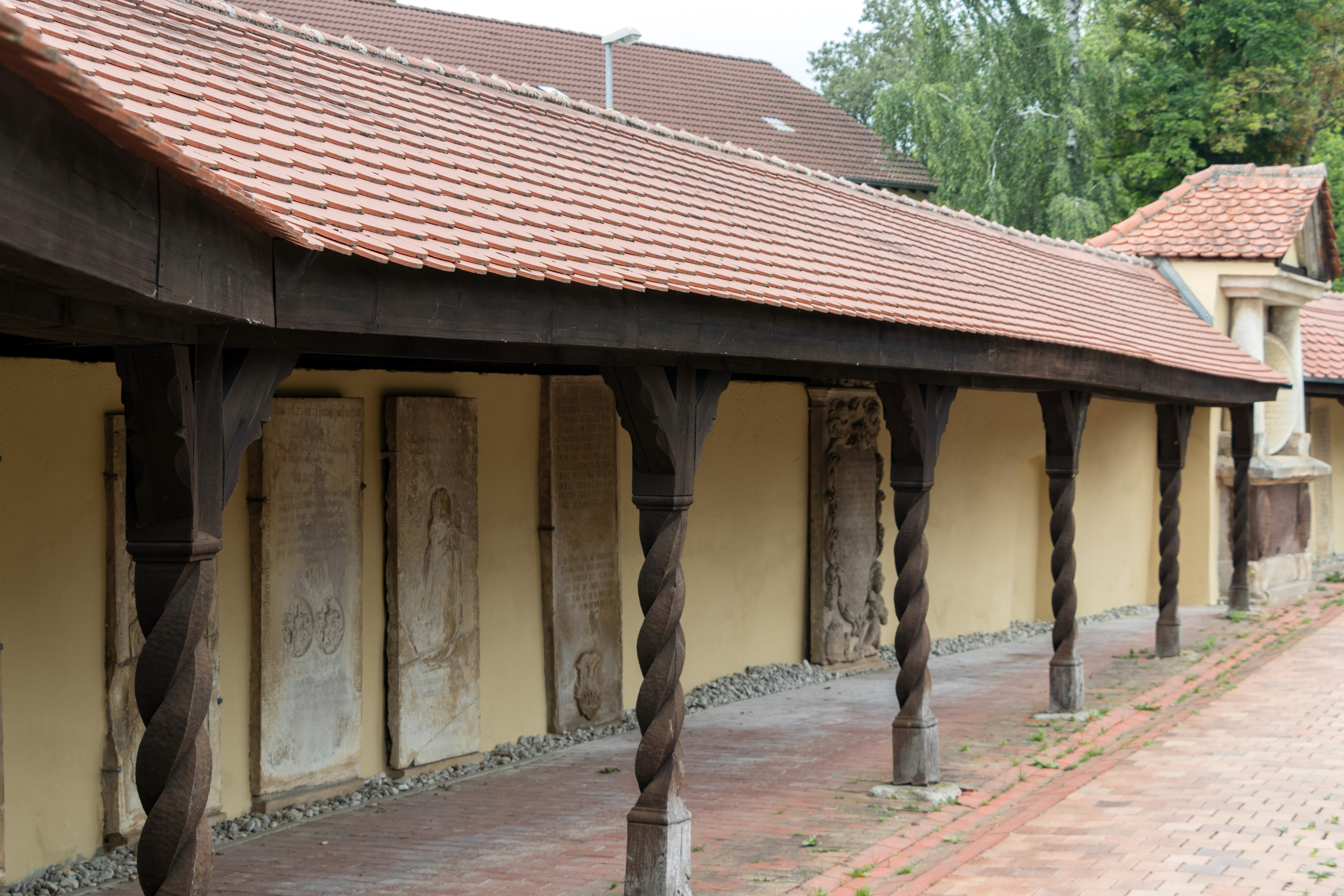 Kleine Landesgartenschau, 2019, Wassertrüdingen, Friedhof